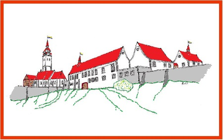 Rekonstrukční kresba Fryštátského hradu v Karviné na základě historického popisu a dochovaných staveb